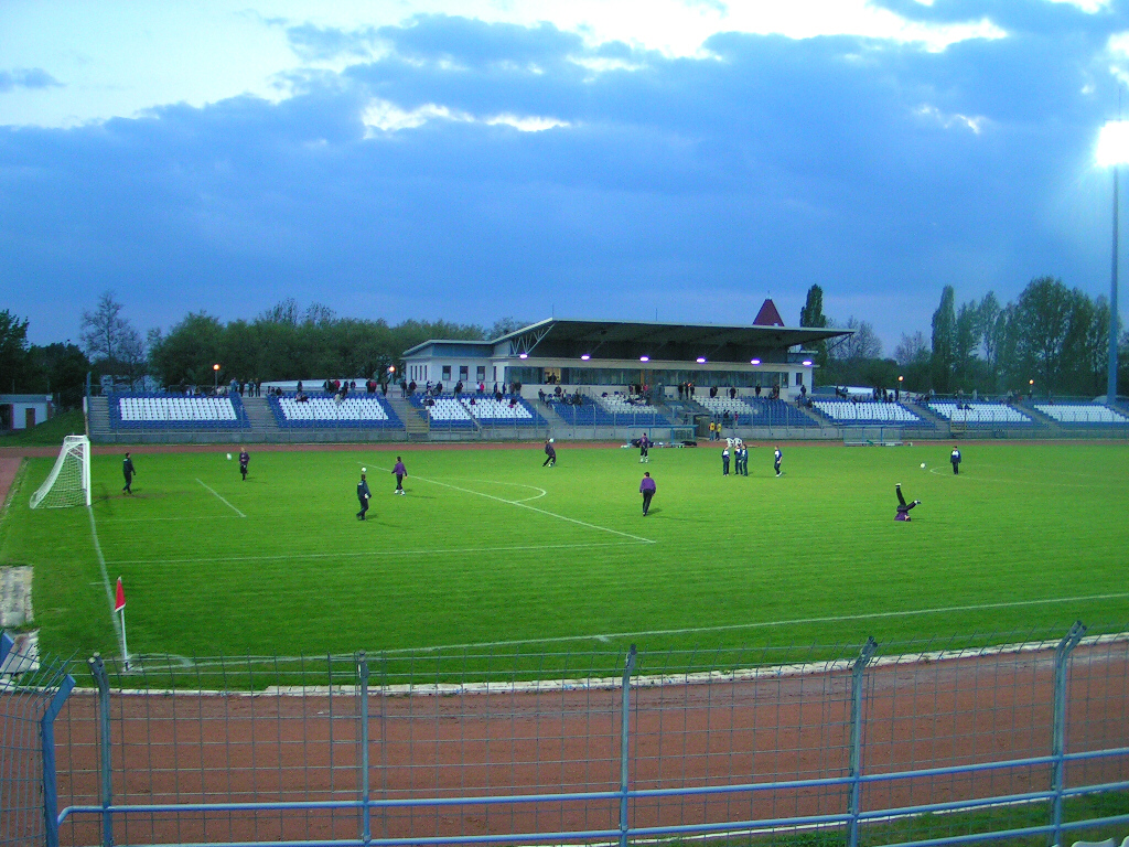 Széktói Stadion, Kecskemét, Hungary